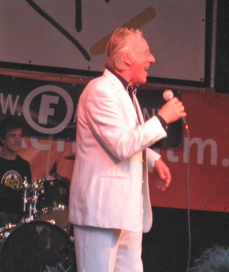 Freek_de_Jonge_-_Koninginnenach_2008